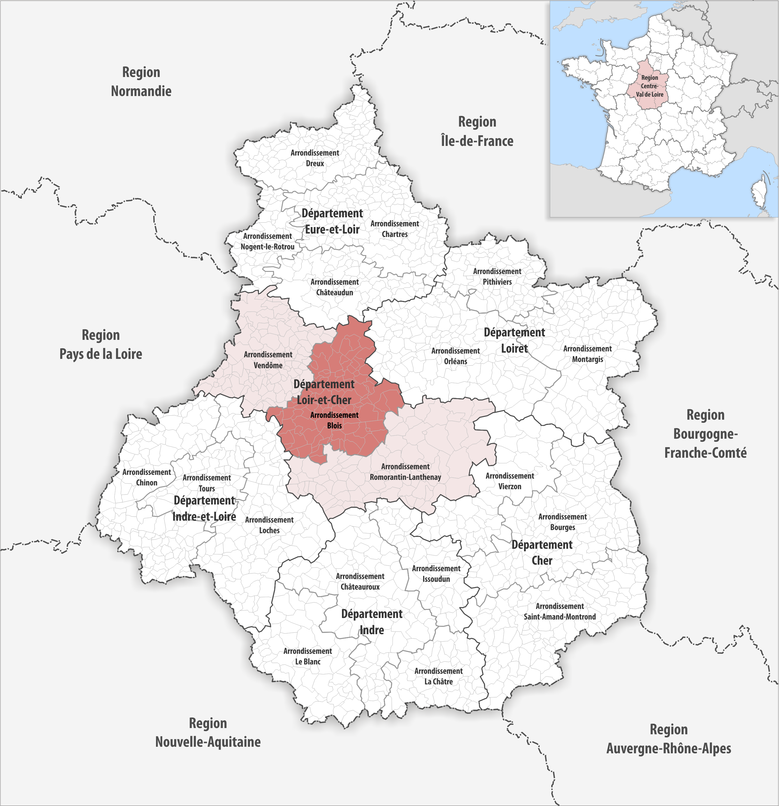 Lage des Arrondissements Blois